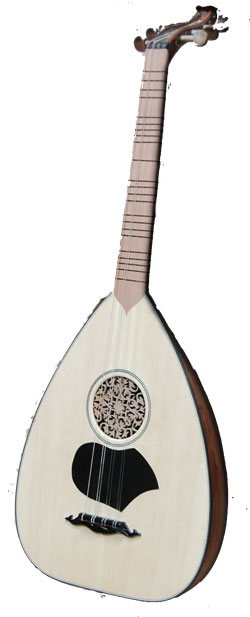 Türk lavtası